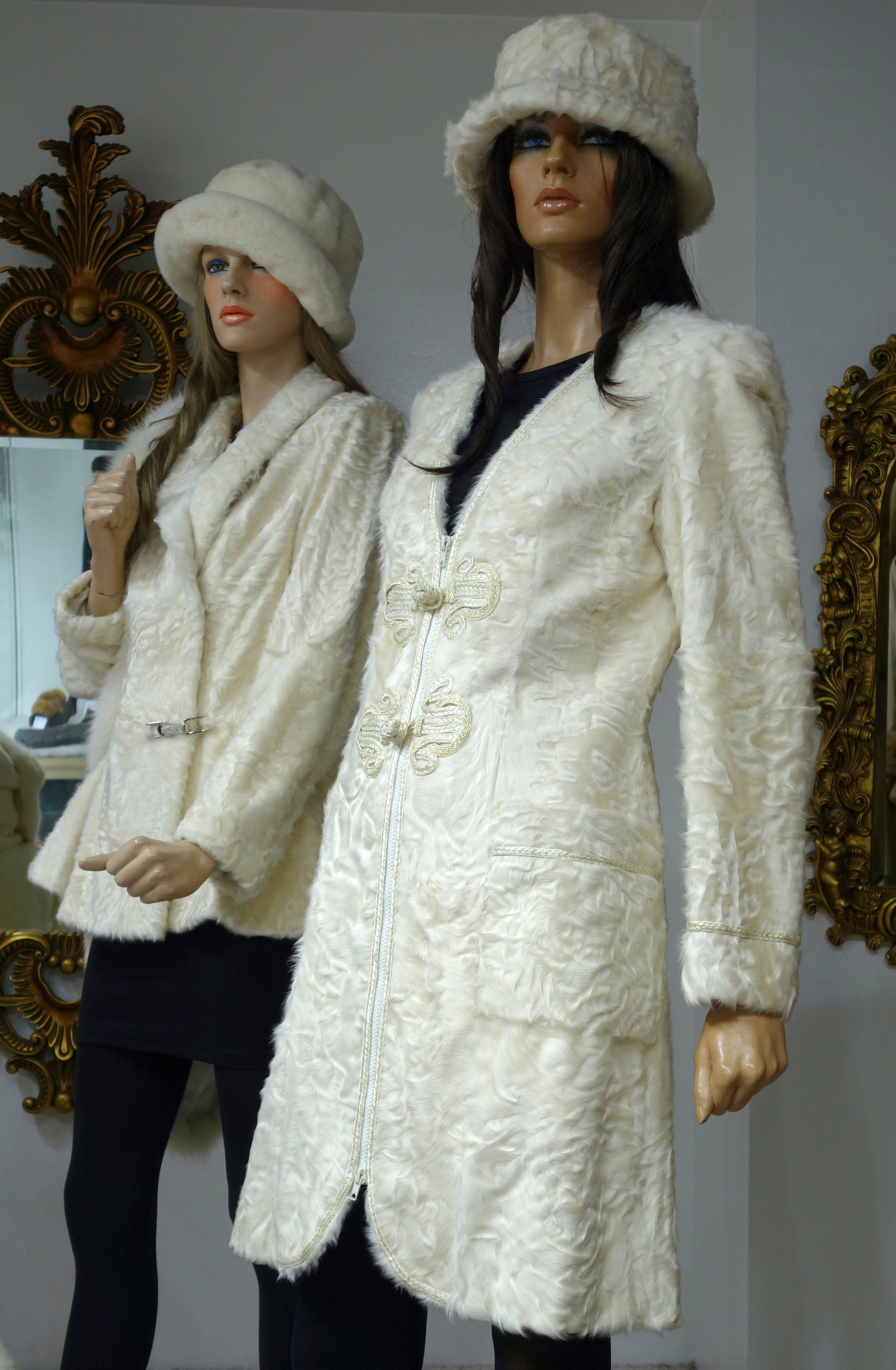 Weiße Silklamm-Jacke und Silklamm-Mantel (Tientsin-Lamm). Gesehen im Pelzhaus Schenkenbach.